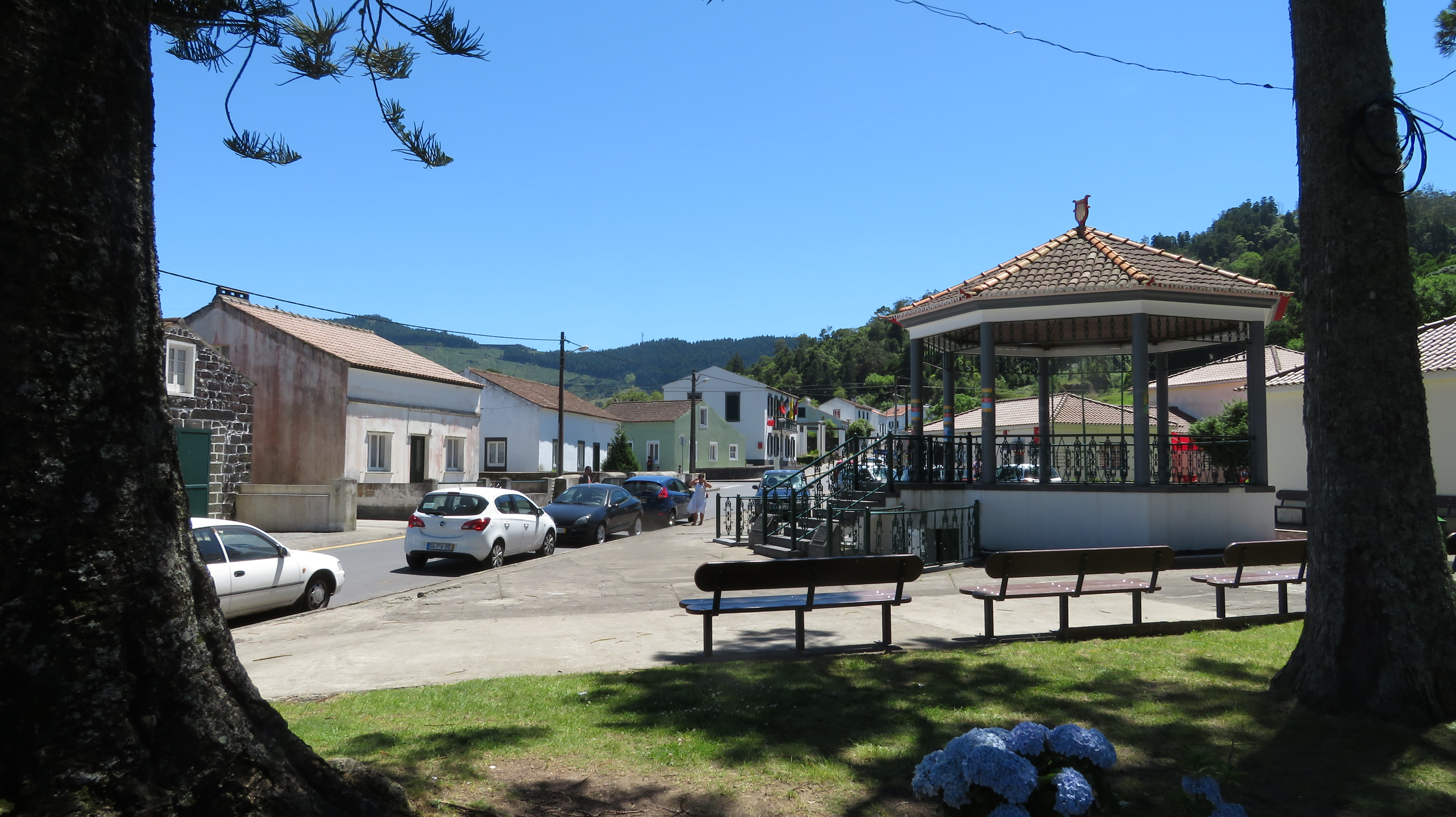 Centro da freguesia Sete Cidades, Ilha de S, Miguel, Acores, Portugal